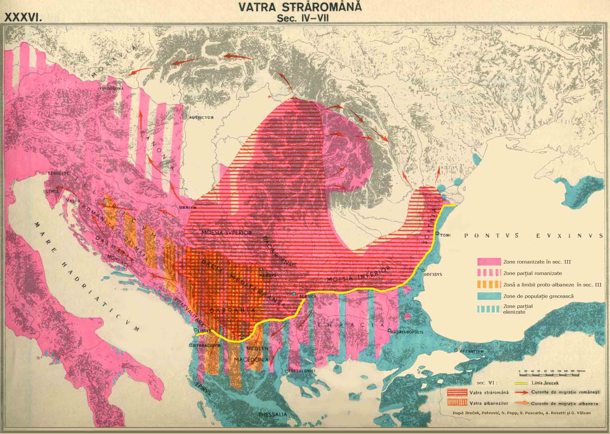 Vatra străromână, drawing according with Jireček, Petrović, Popp, Pușcariu, Rosetti and also Mircea Cociu, Spațiul etnic românesc, ed. Militară, Bucharest 1993, ISBN 973-32-0367-X